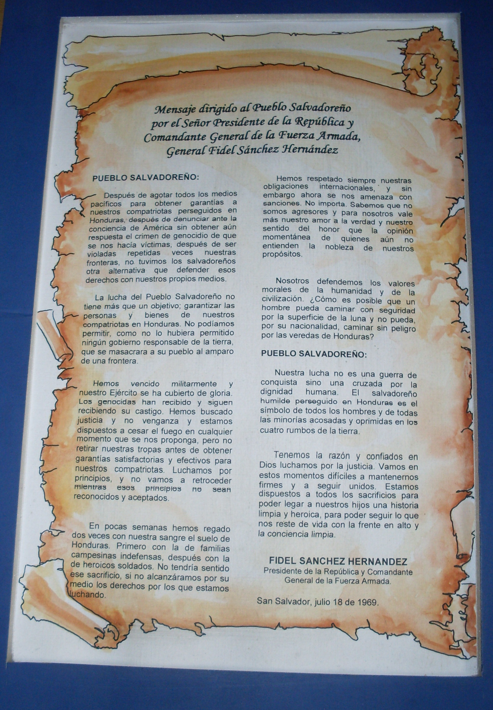 Mensaje del Presidente Fidel Sánchez Hernández del 18 de julio de 1969 en el marco de la Guerra de las Cien Horas.